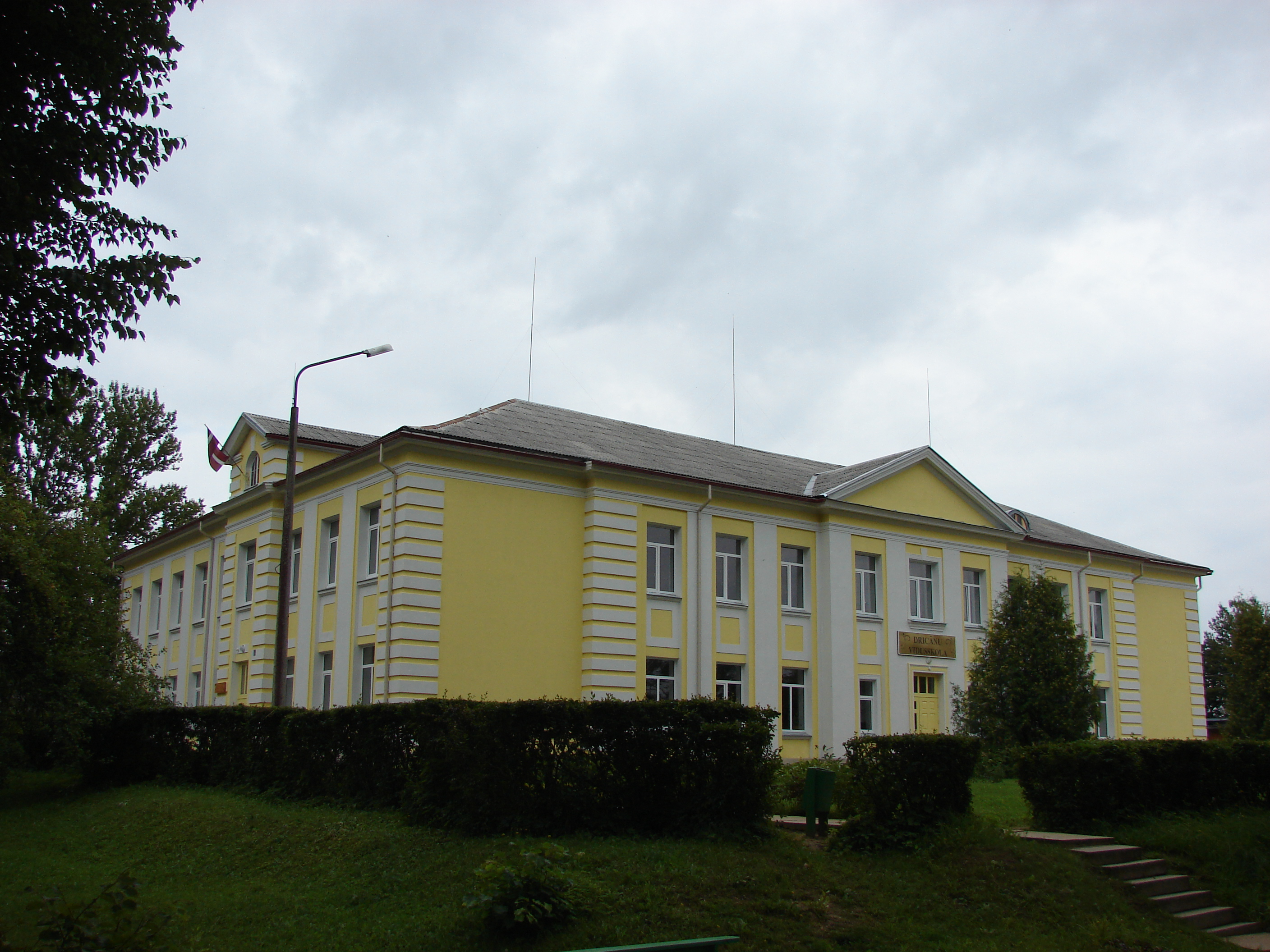 Szkoła średnia w Drycanach.